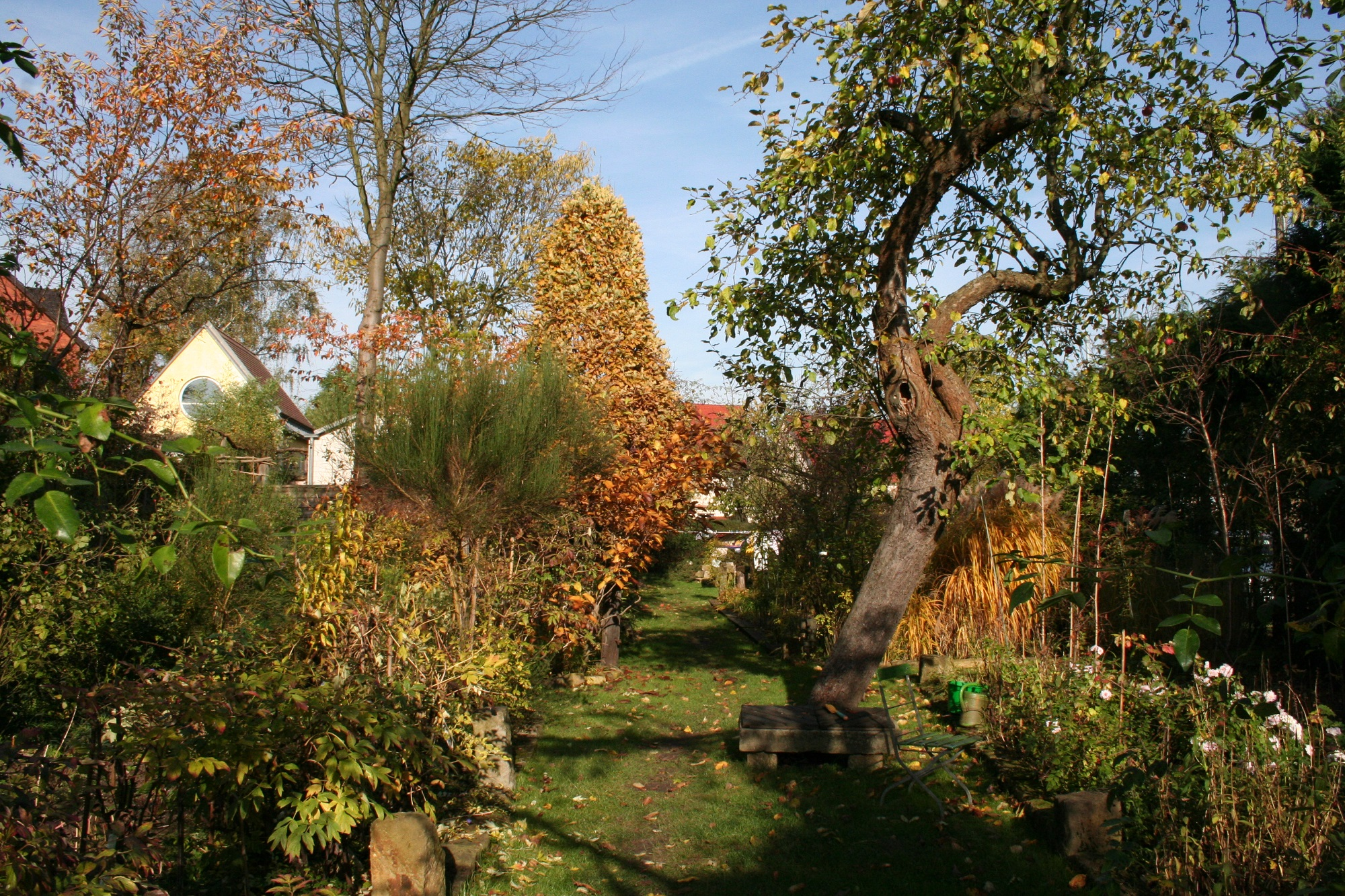 Pfarrgarten Saxdorf (November 2014)